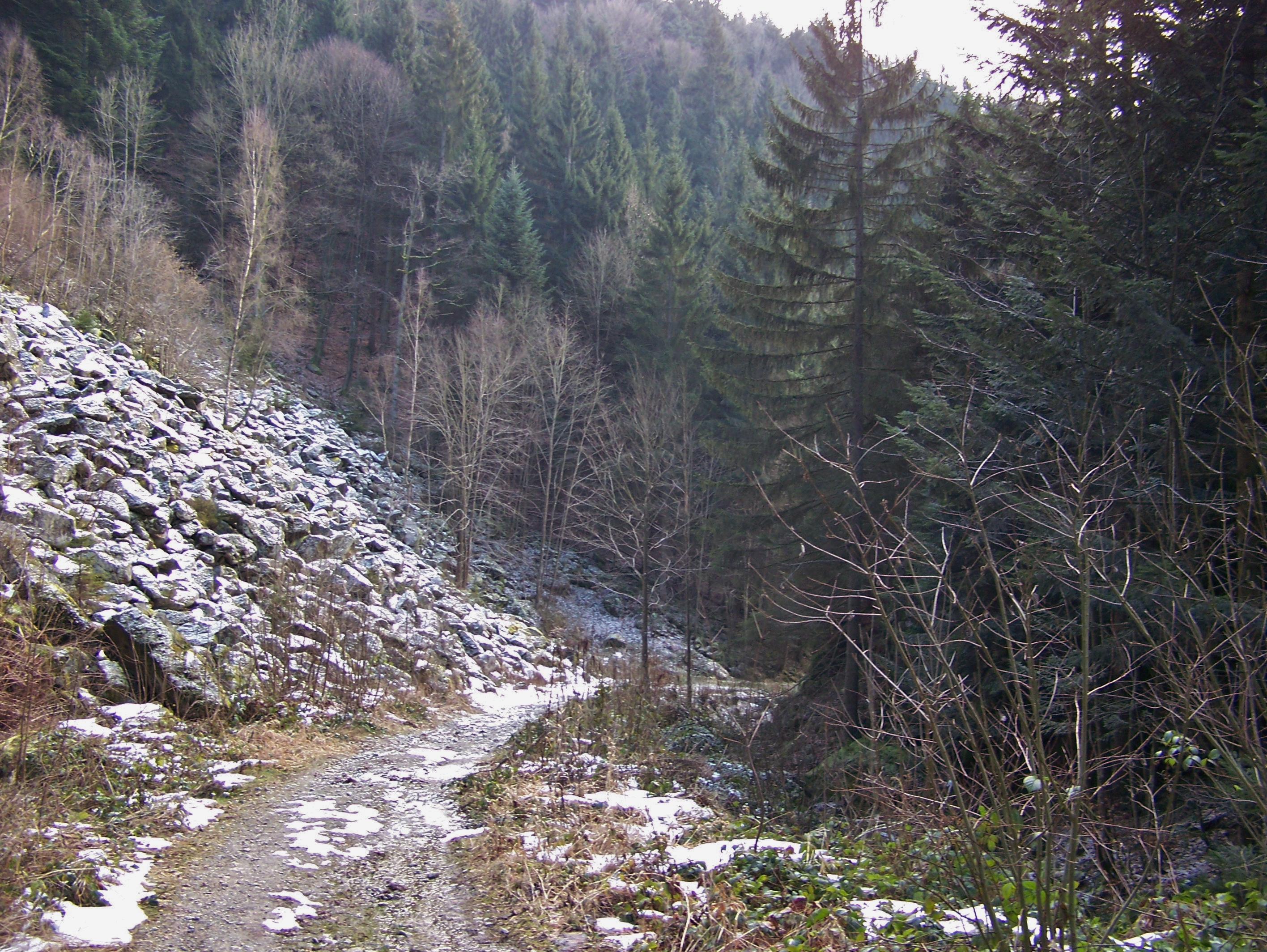 Weg durch die Saulochschlucht